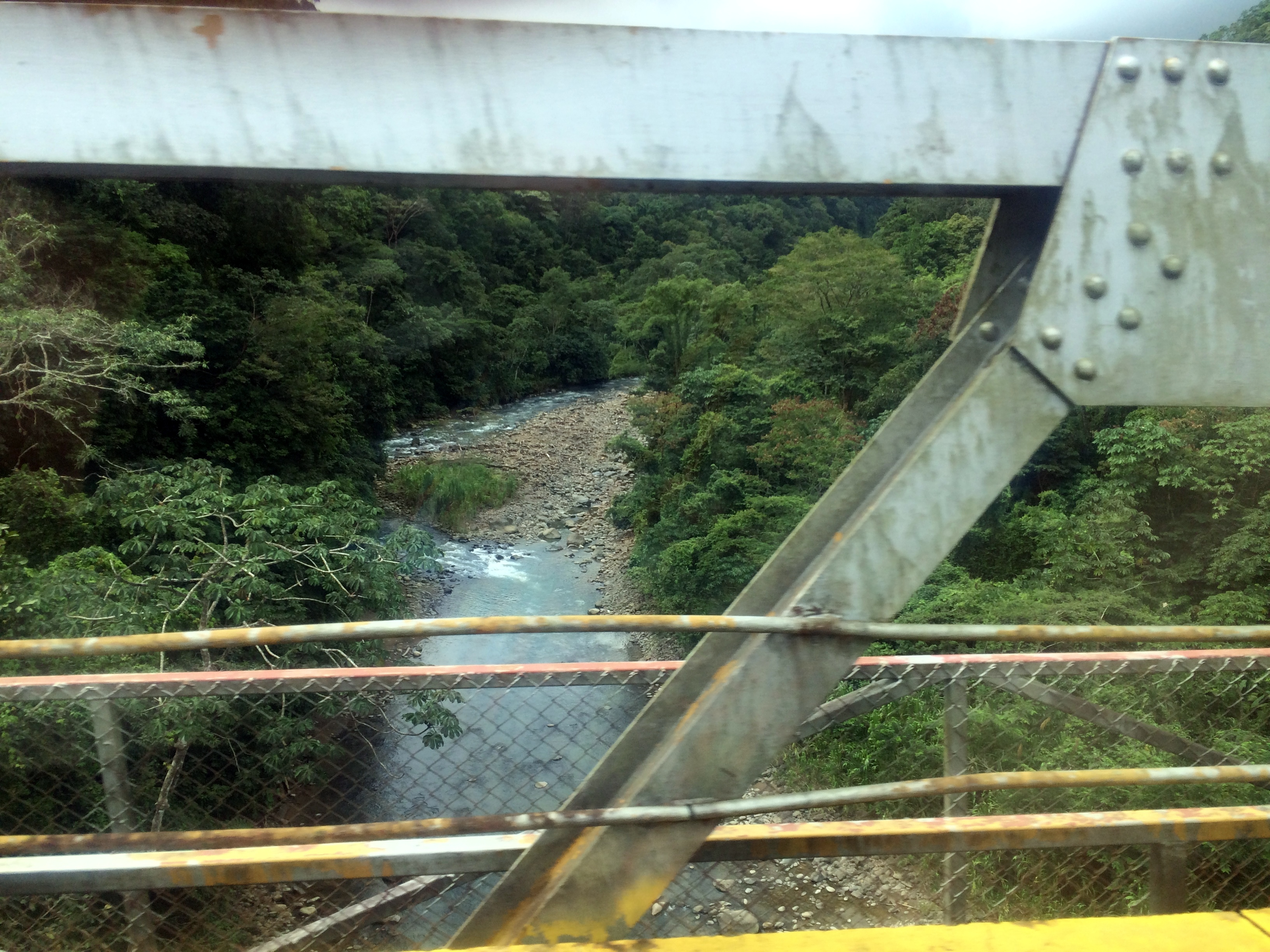 Paso sobre el puente sobre el río Peñas Blancas, en La Fortuna de San Carlos, Costa Rica.